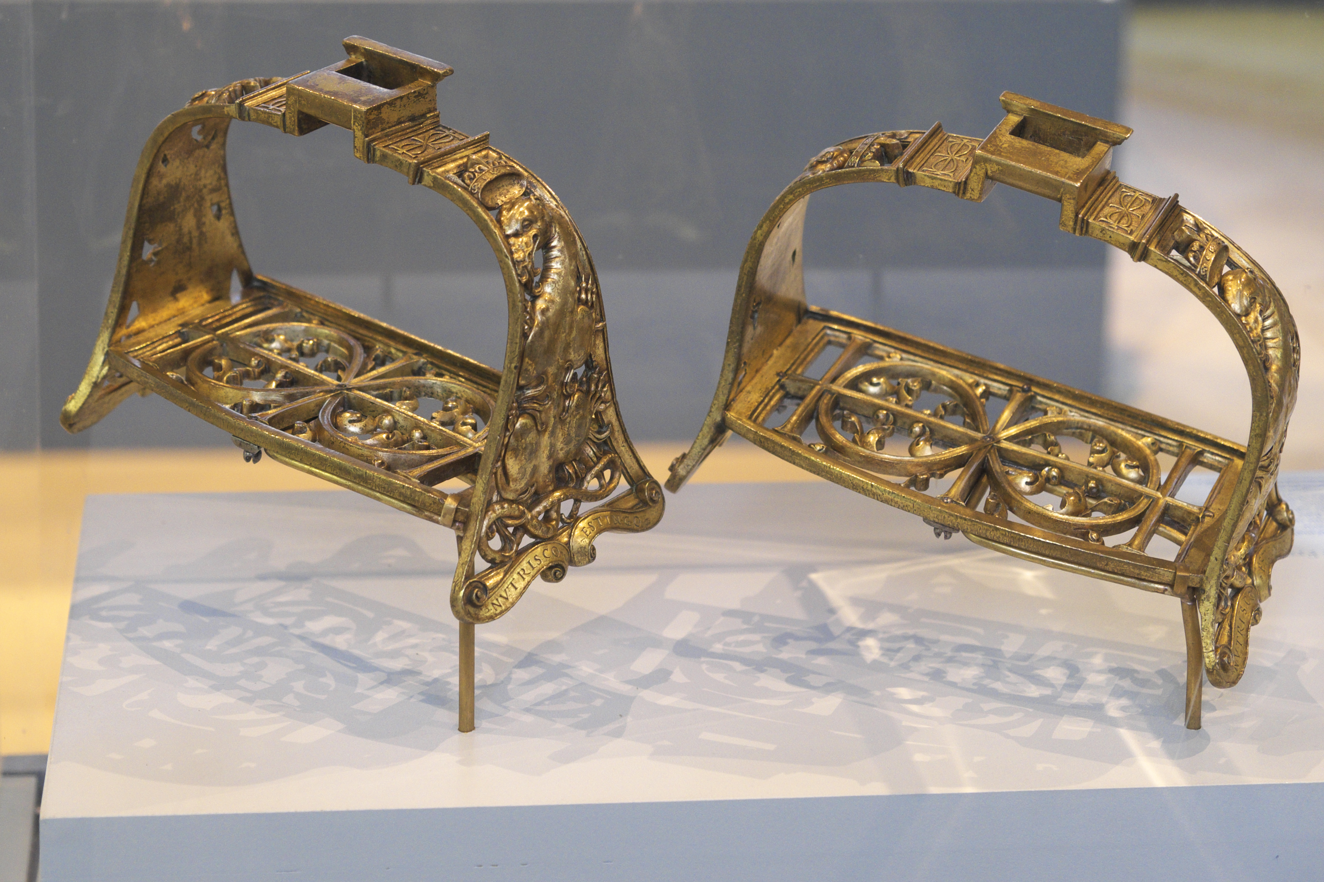 Musée national de la Renaissance im Schloss Écouen im Département Val d'Oise (Île-de-France/Frankreich), Steigbügel von Franz I. mit Salamander und Inschrift